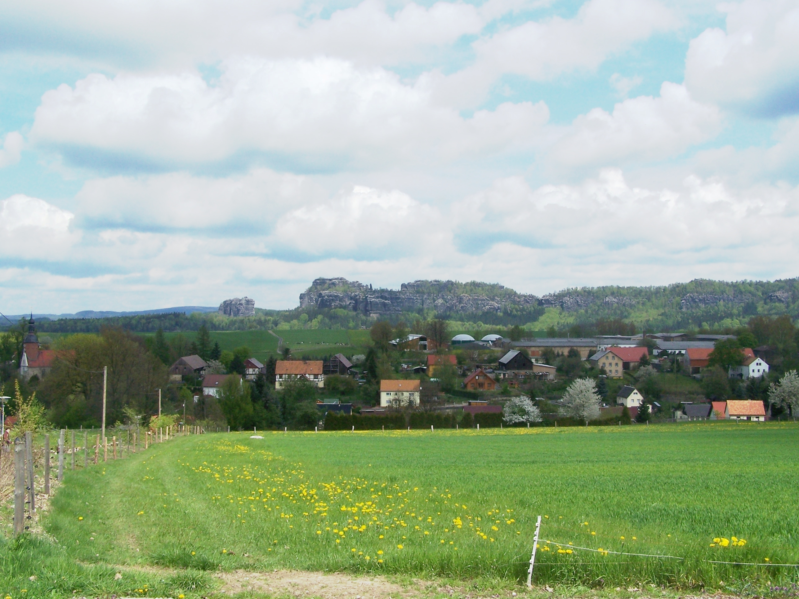 Reinhardtsdorf, Sächsische Schweiz, im Hintergrund die Schrammsteine